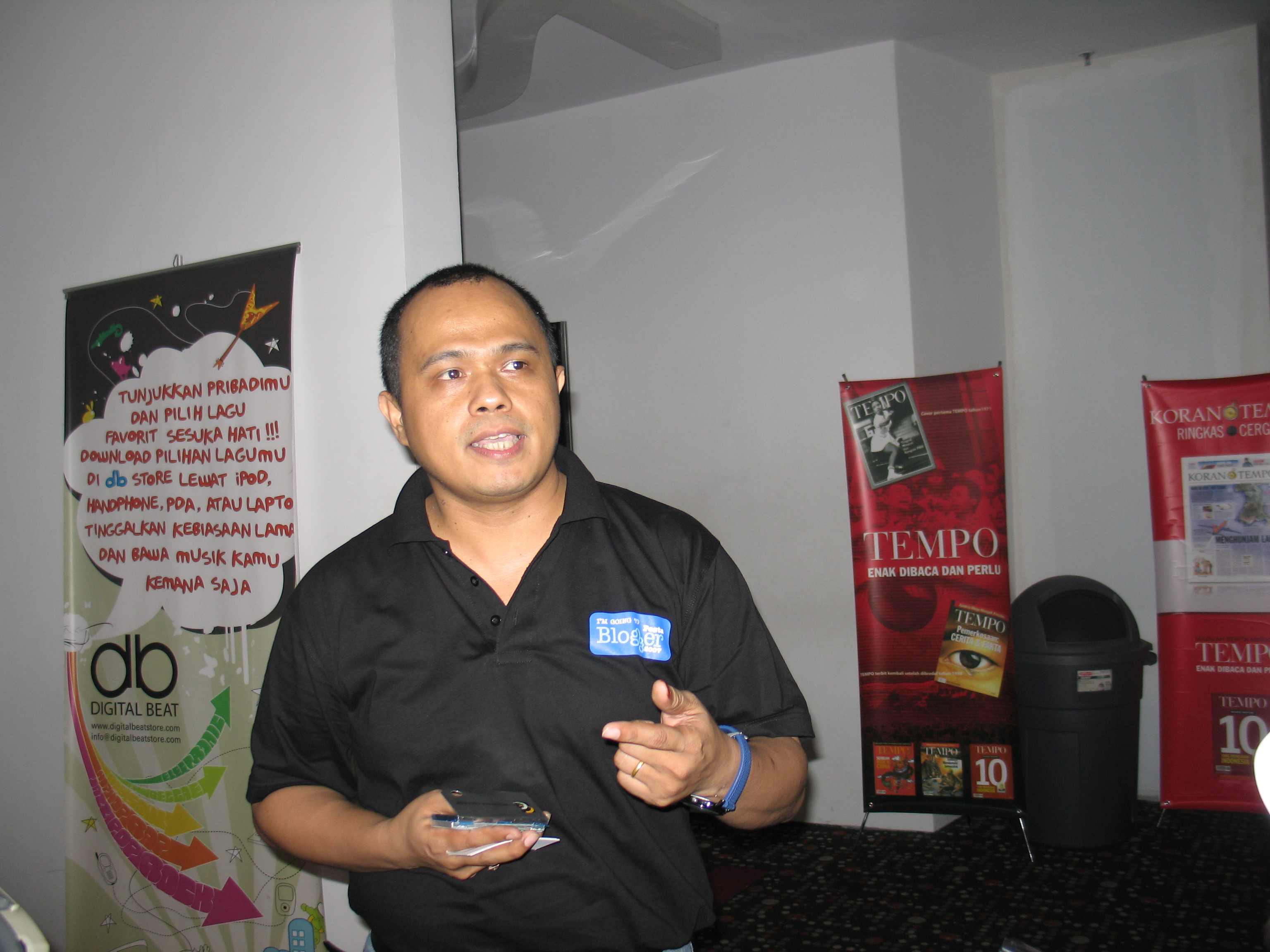 Budi Putra di Pesta Blogger 2007 di Jakarta